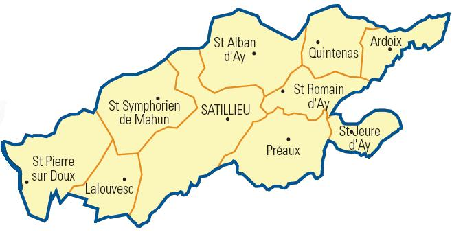 Carte détaillée des communes du canton (Ardèche)